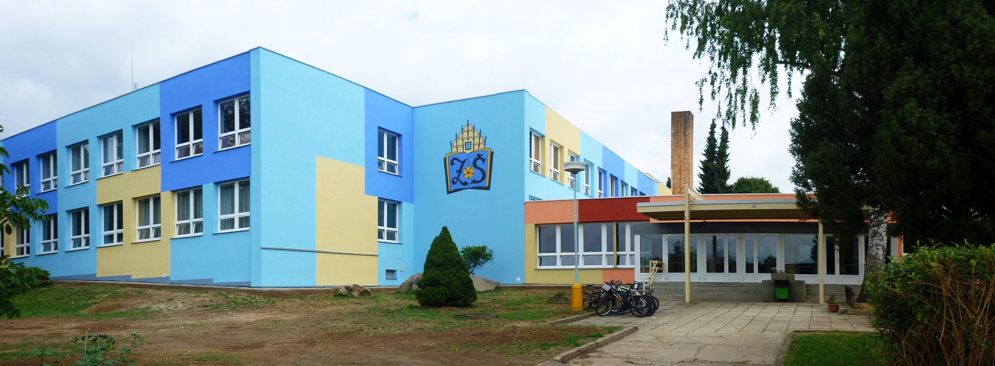 Základní škola Slavonice - pohled na hlavní vchod a pavilon druhého stupně